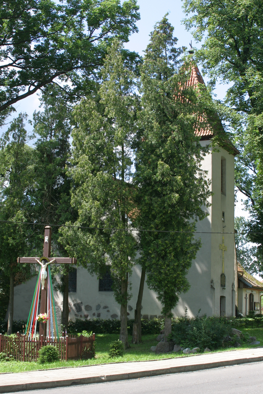 Nakomiady - dawny kościół ewangelicki, obecnie rzymskokatolicki parafialny p.w. św. Józefa, wraz z cmentarzem przykościelnym, XVI, 1932